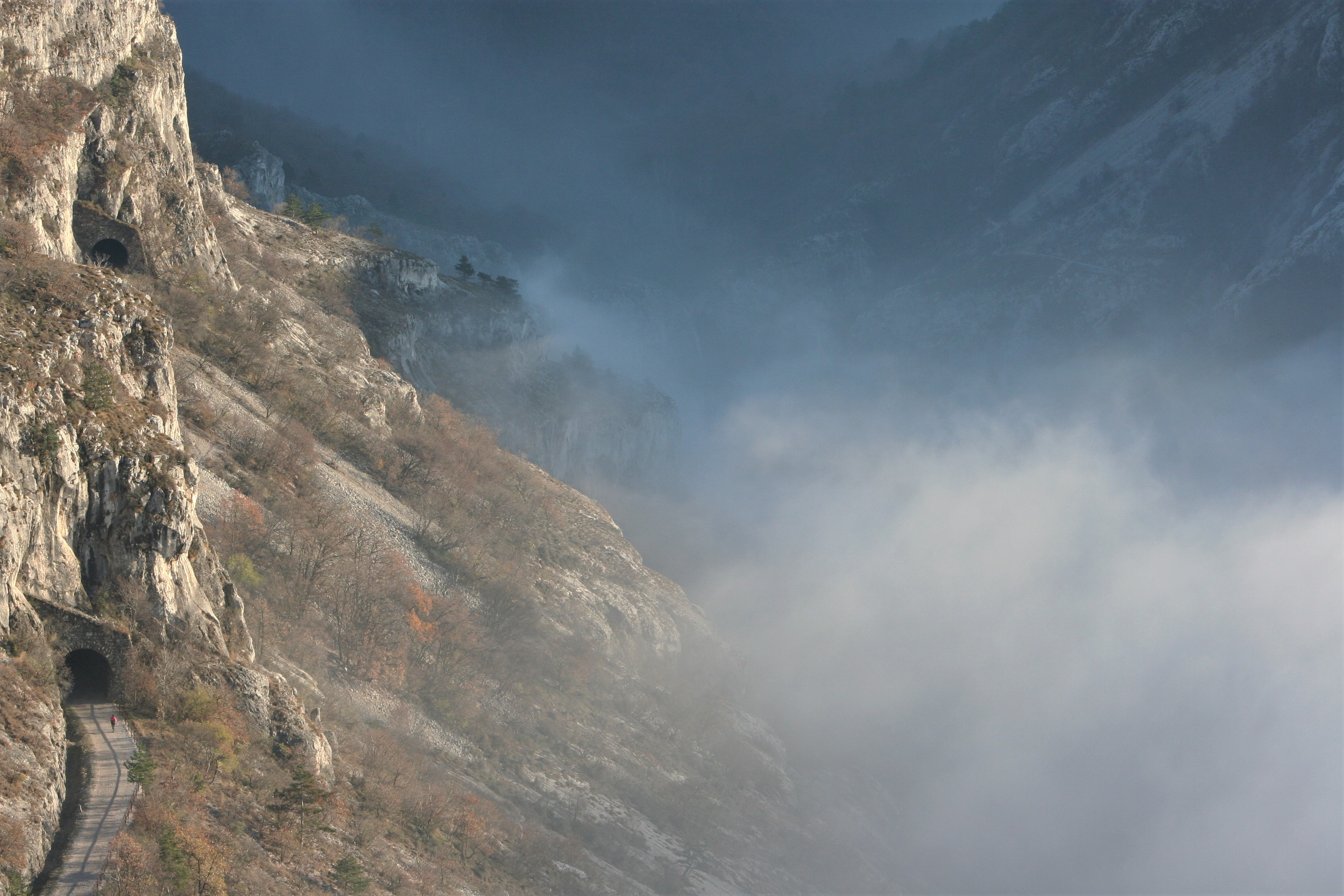 Pista ciclopedonale Giordano Cottur Trieste-Bottazzo- Draga_Kozina. Le gallerie e di fronte si intravedono tra la nebbia i ghiaioni del Monte Carso.